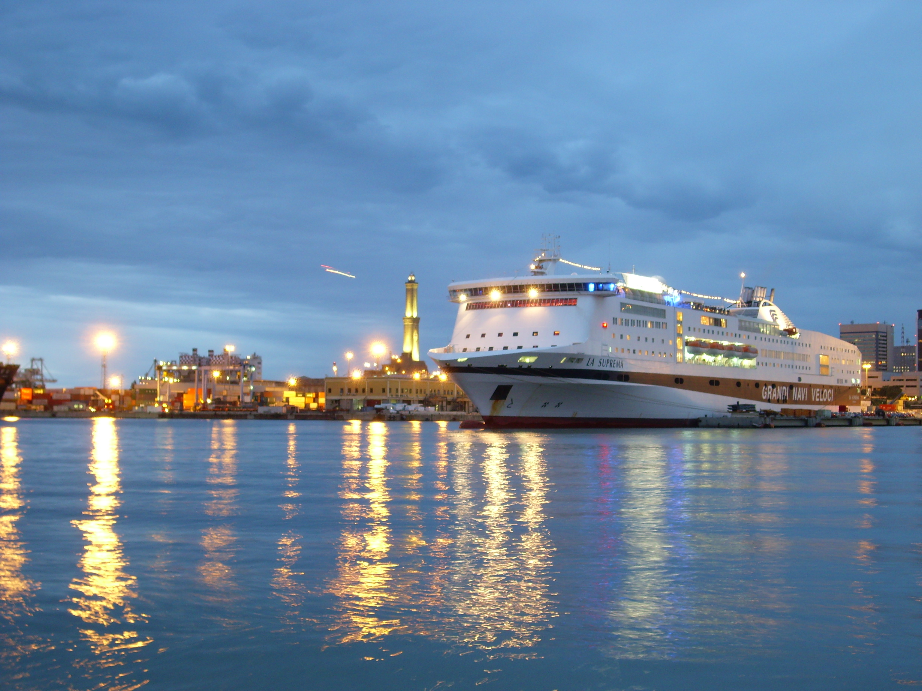 Il porto di Genova di notte, fotografato dall'aera dell'Expò